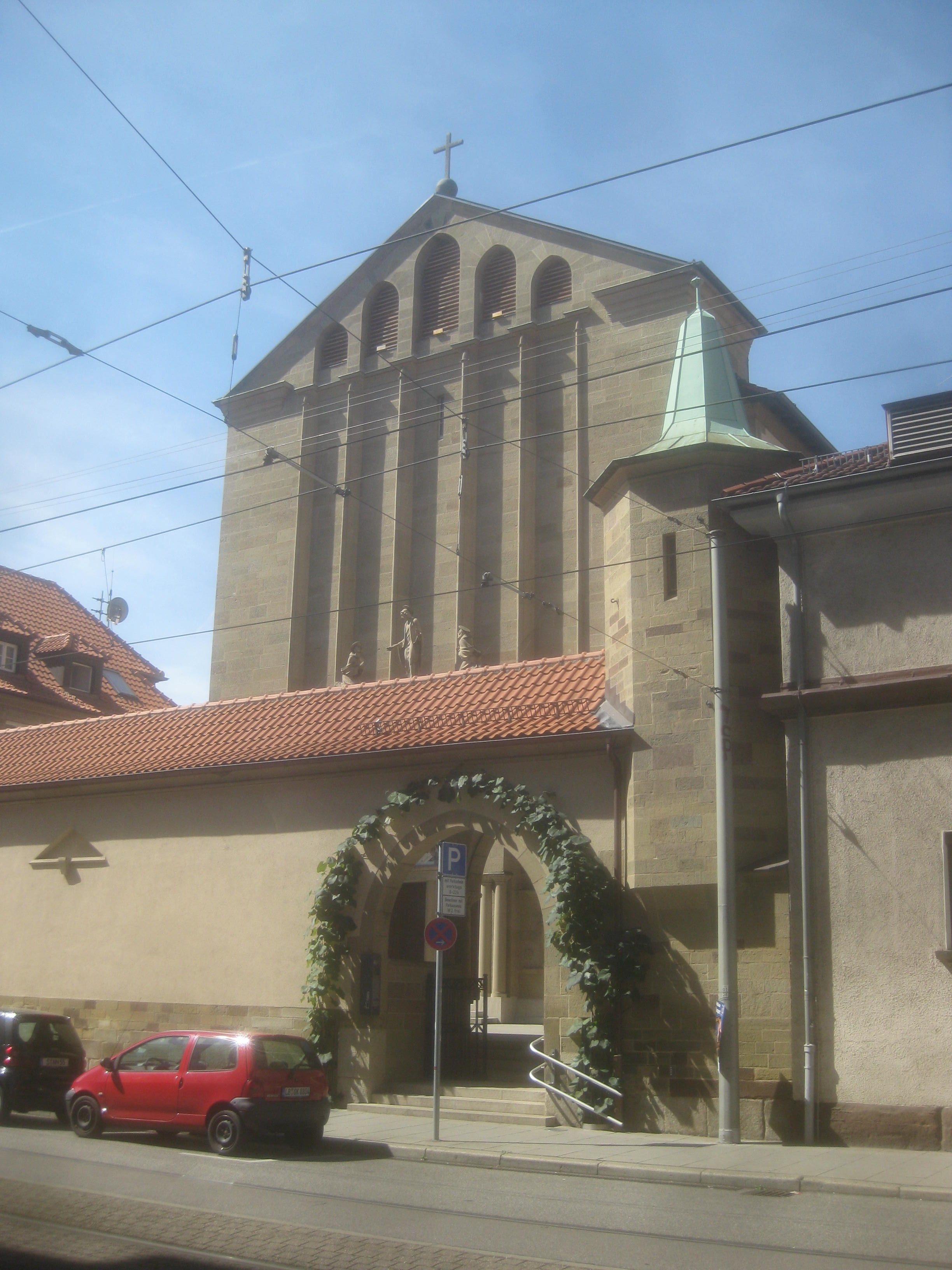 Ansicht der katholischen St. Fideliskirche in Stuttgart von der Seidenstraße aus.